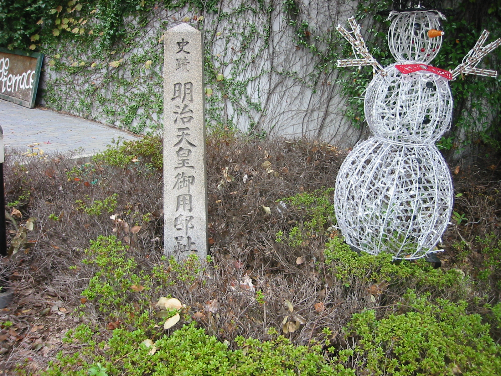 明治天皇御用邸趾 神戸ハーバーランドにて